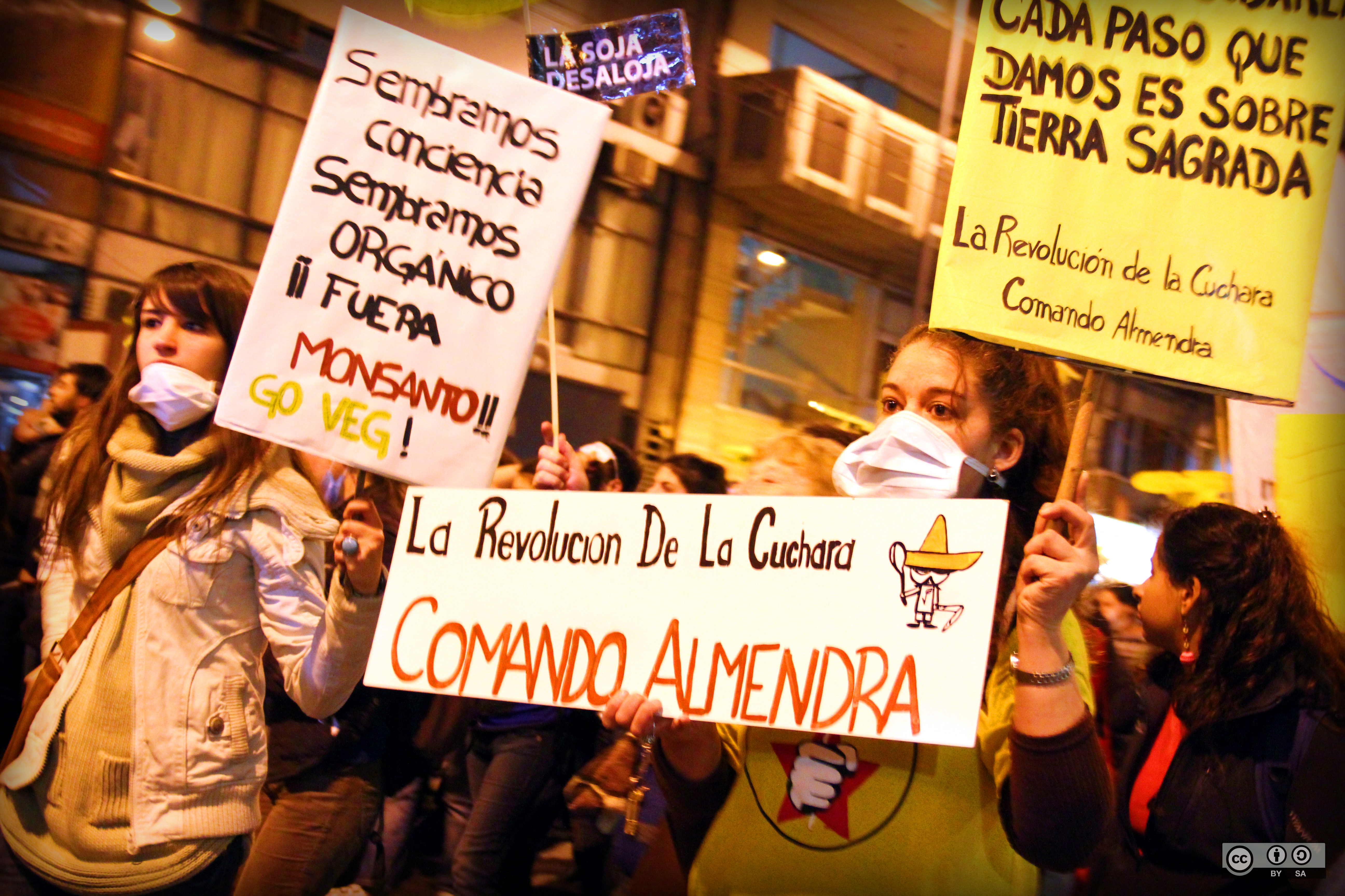 19.07.2012 Paren de Fumigar - Fuera Monsanto Esta obra de Romina Martino está bajo una licencia Creative Commons Atribución-CompartirIgual 3.0 Unported.